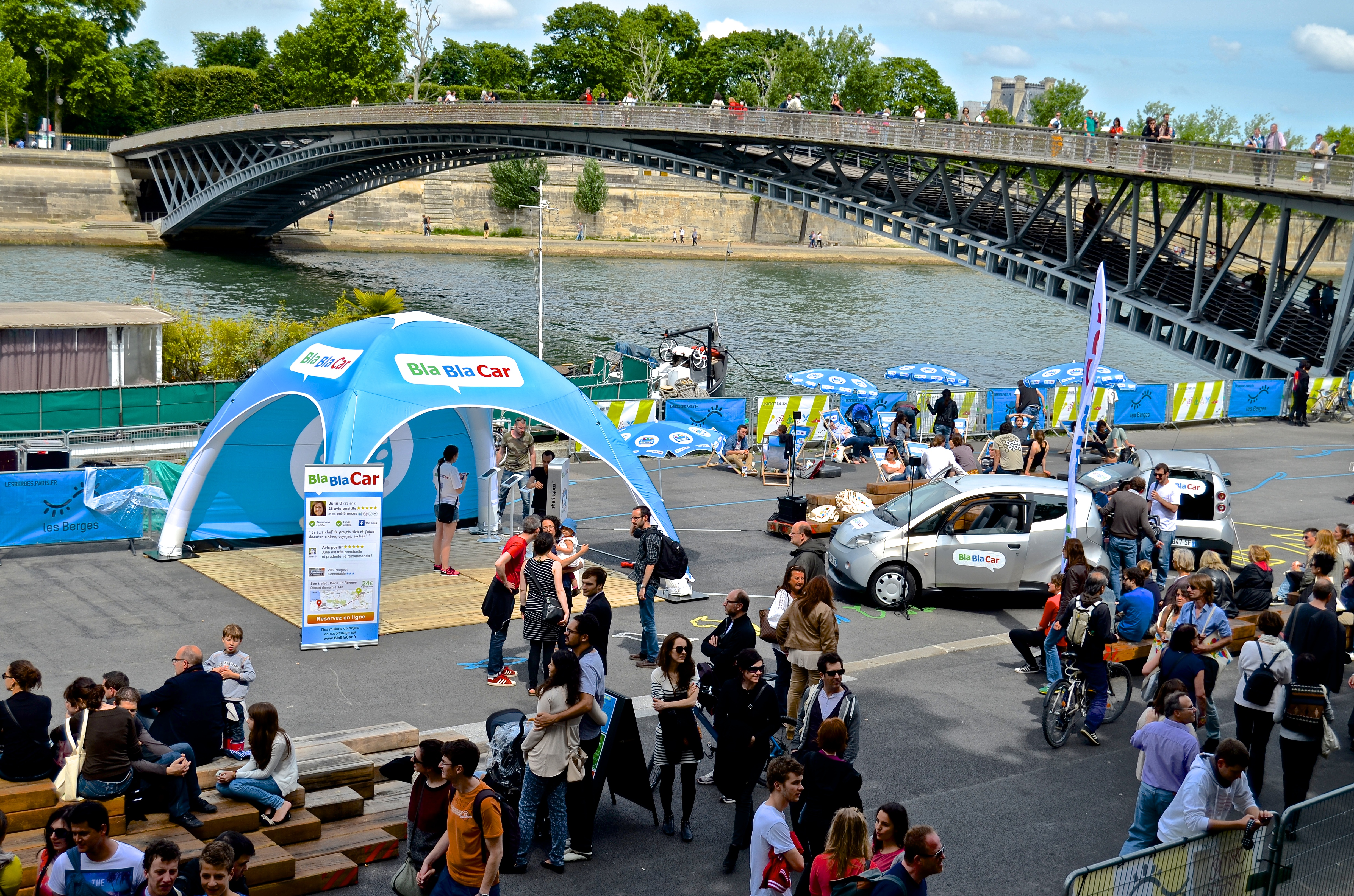 Bla Bla car promotion